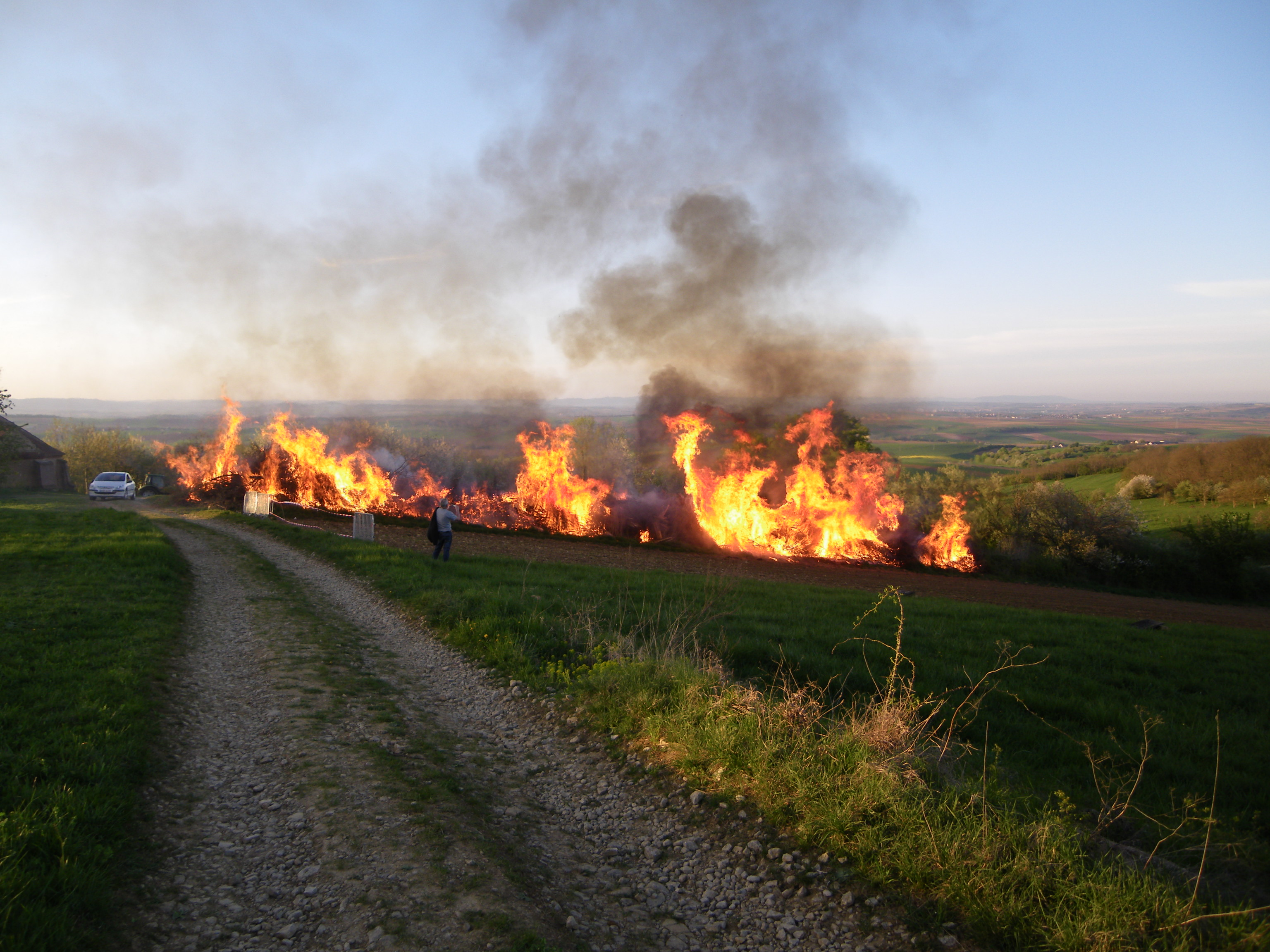 C'est le feu pour le Schiewackefier